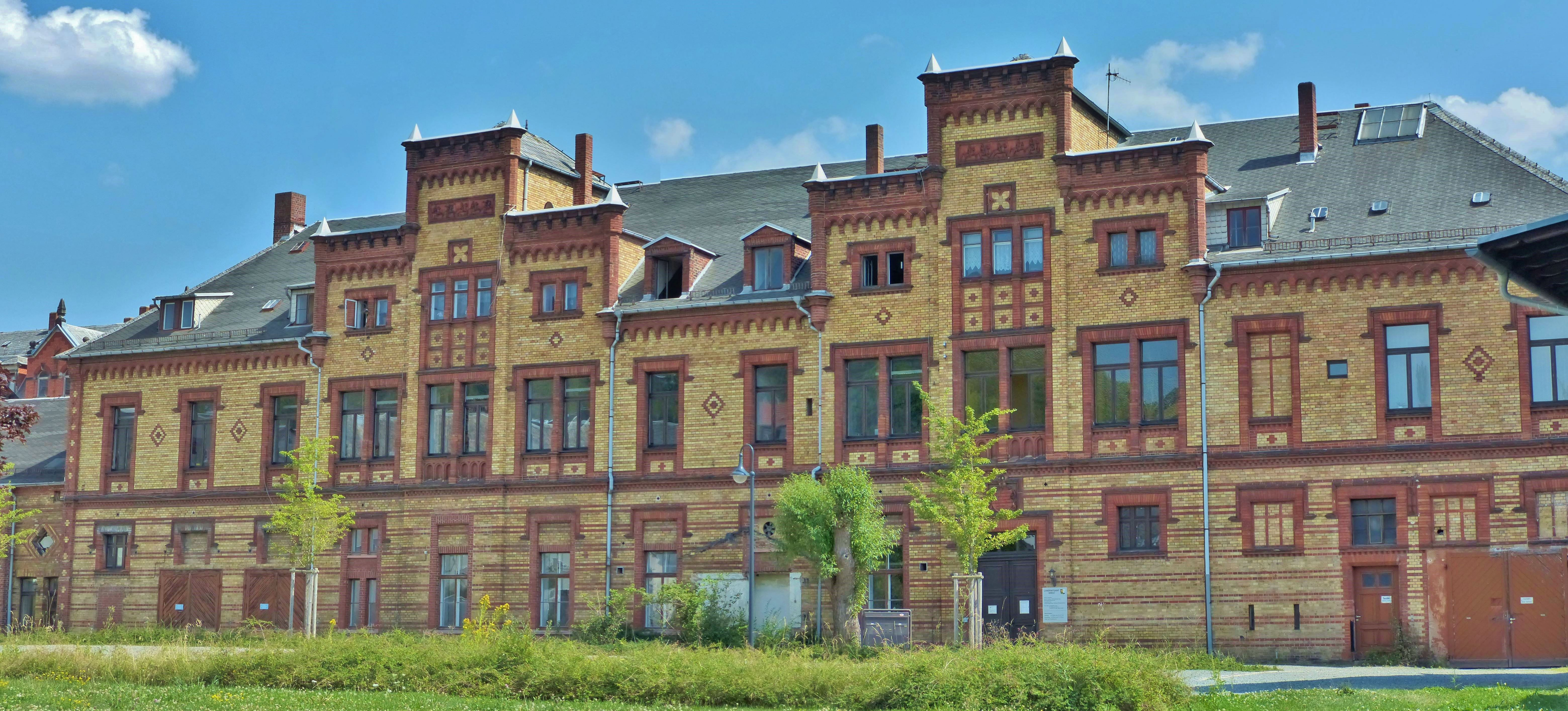 Ehemals Fürstlicher Reussischer Marstall in Greiz. Erbaut 1870 unter Heinrich XXII (Reuß älterer Linie).